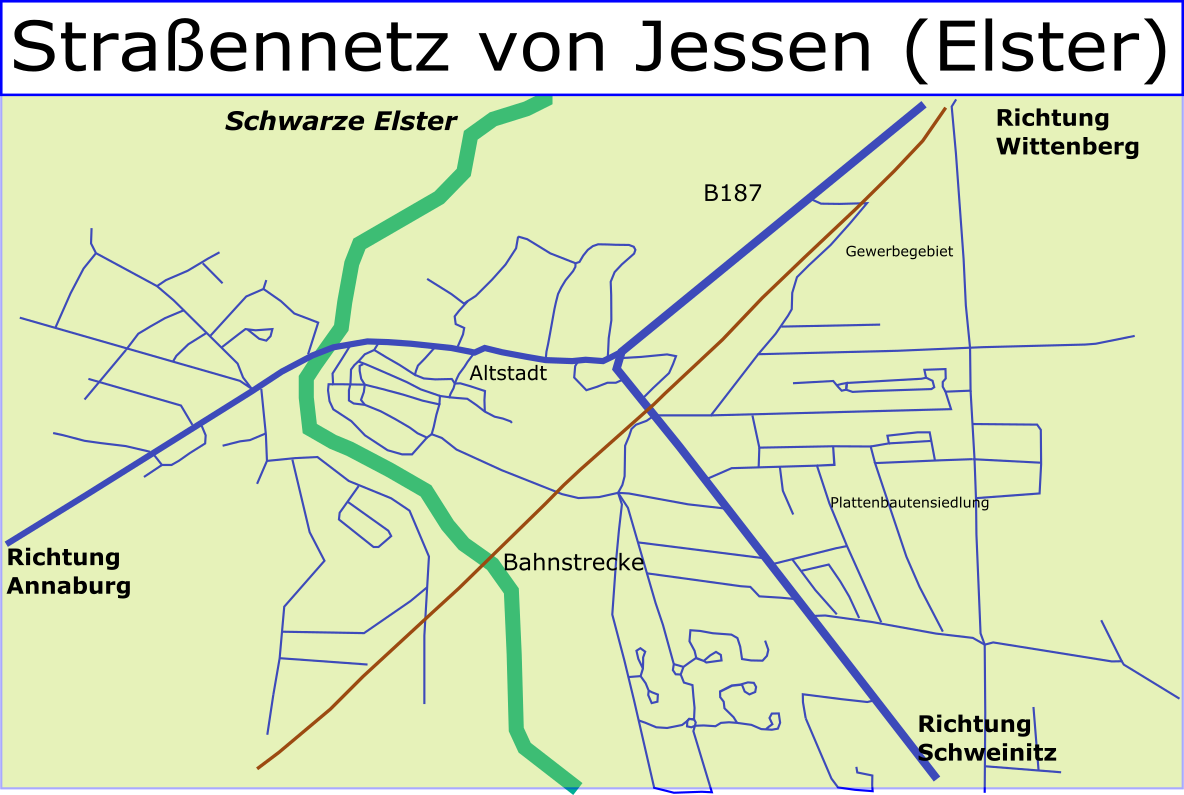 Jessens Straßennetz als Skizze